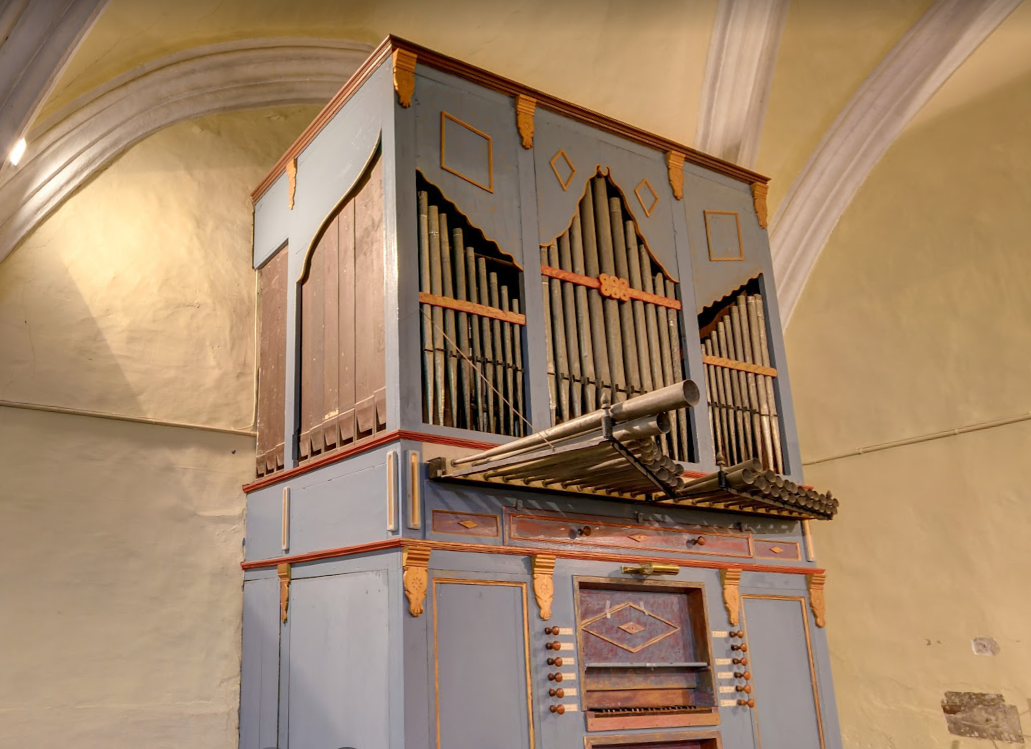 Organo Roqués de Perdiguera